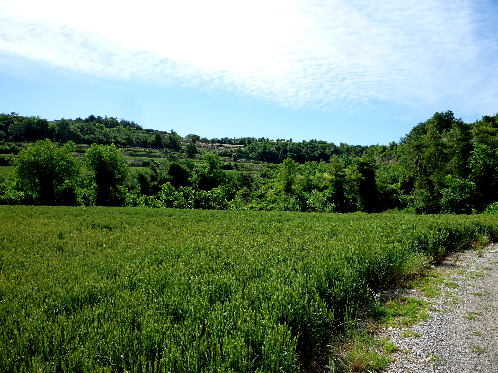 Camps i boscos a la dreta de la riera de Mussa ( Carbasí) This is a a photo of a natural area in Catalonia, Spain, with id: ES510096